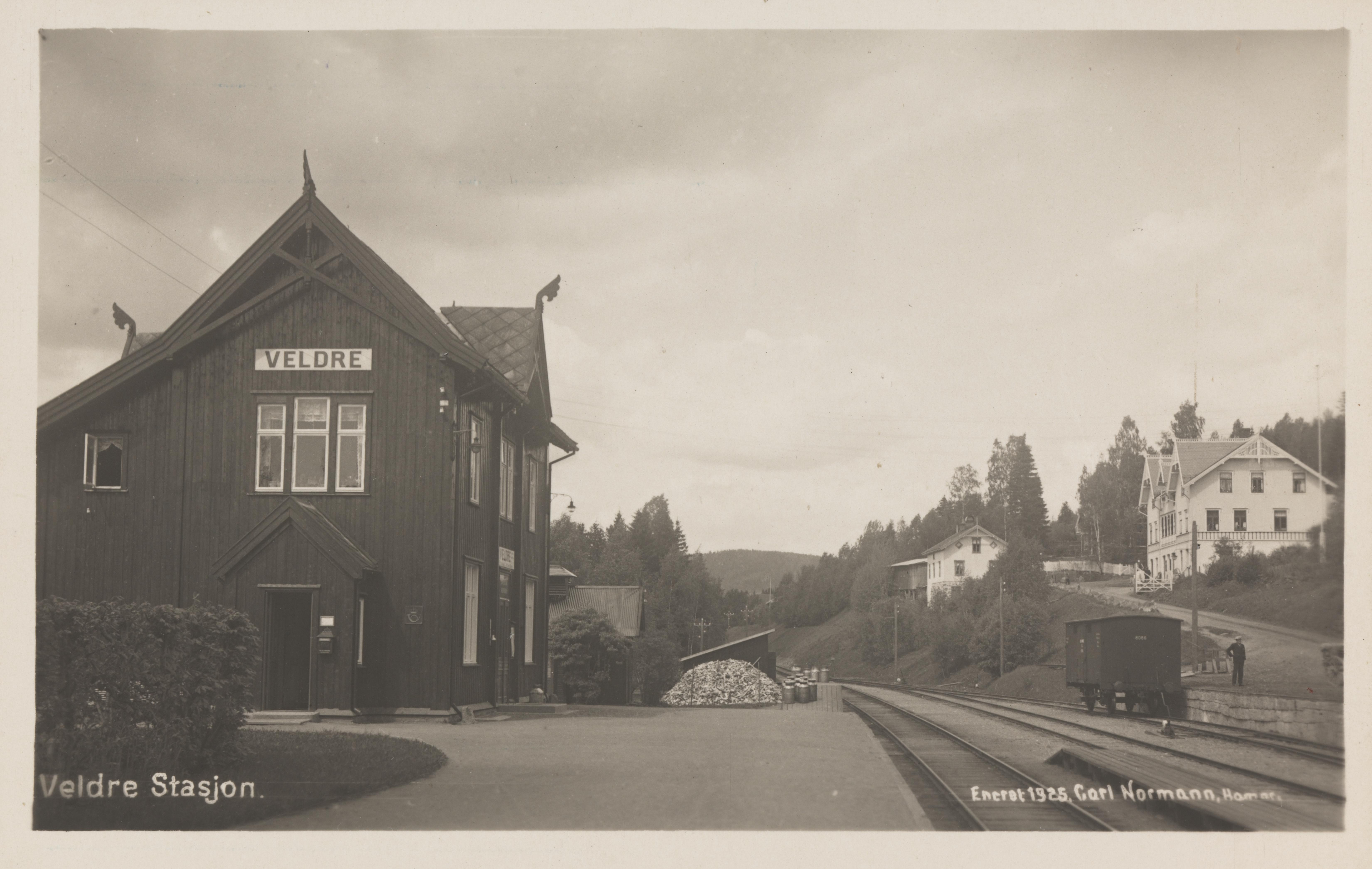 Bildet er hentet fra Nasjonalbibliotekets bildesamling Brumundal,Veldre,Veldre stasjon, Ringsaker, Hedmark